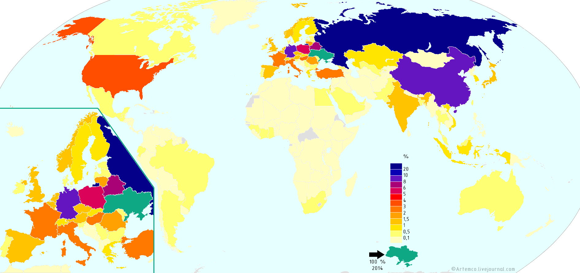 доля стран в общем импорте в Украину